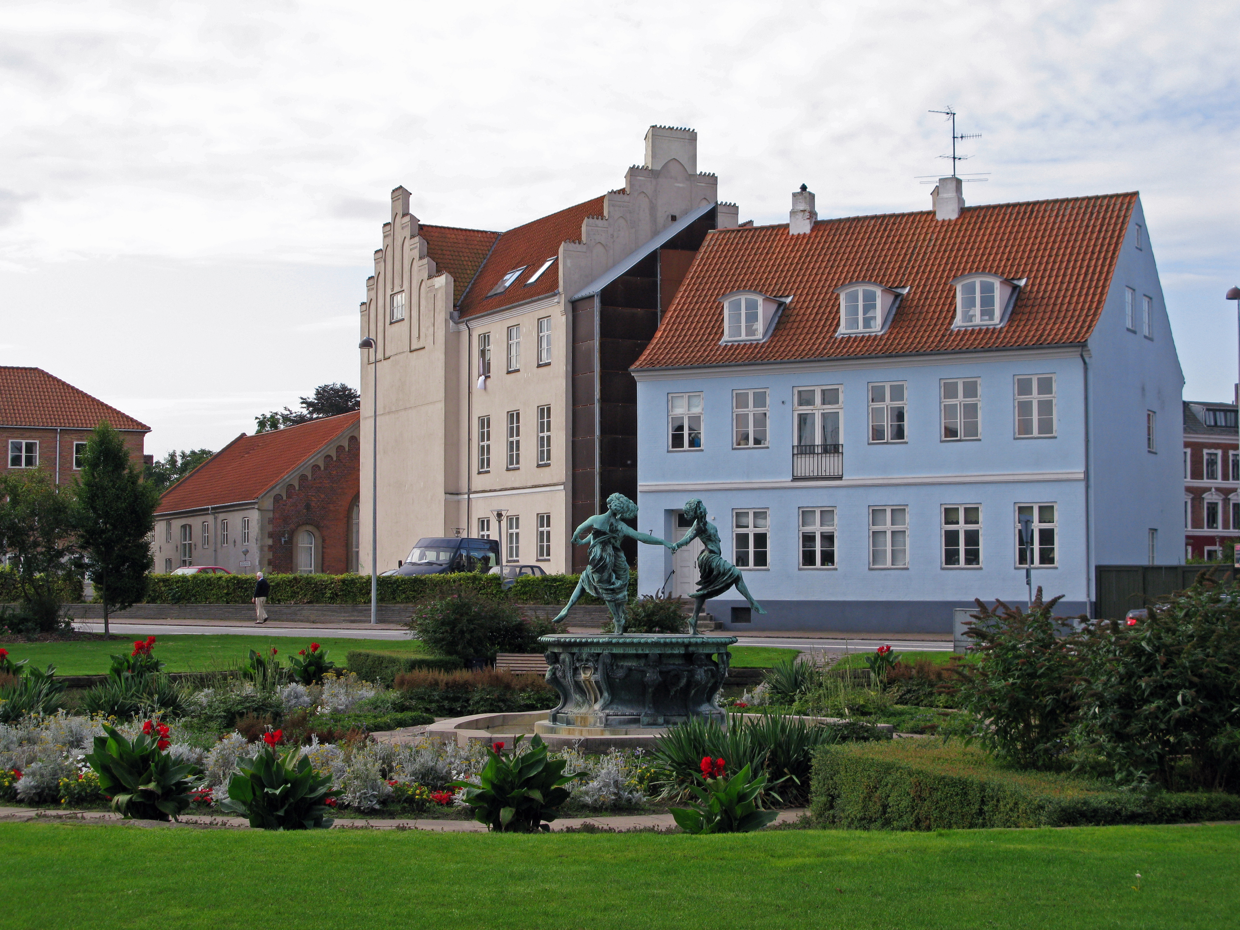 Danserindebrønden in Helsingør, Denmark ( source)